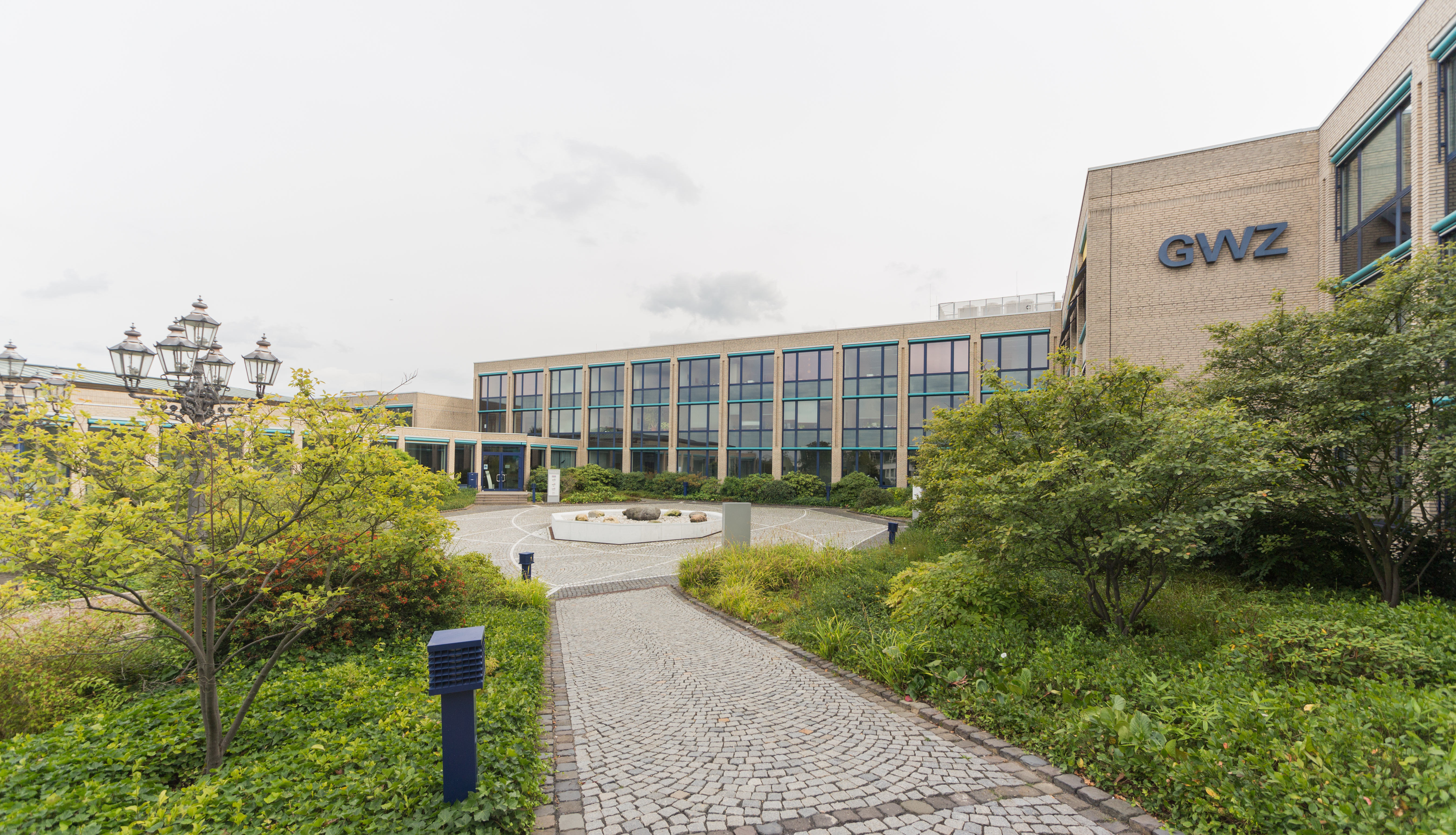 Josef-Wirmer-Straße 1–3, Bonn: Blickrichtung Süden